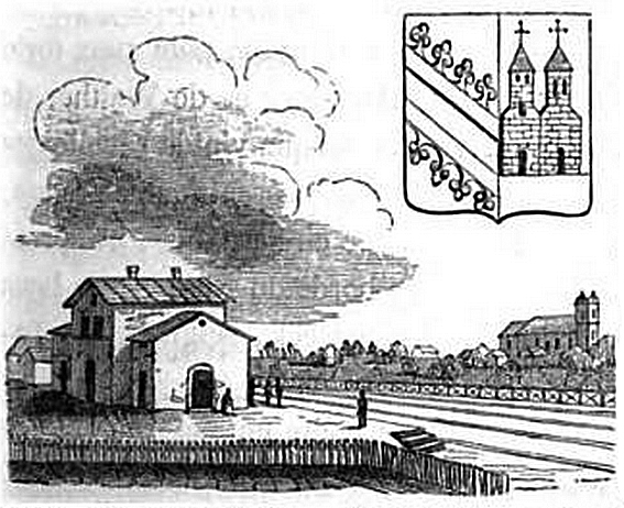 Gravure représentant la gare d'Erstein, sur le chemin de fer de Strasbourg à Bâle